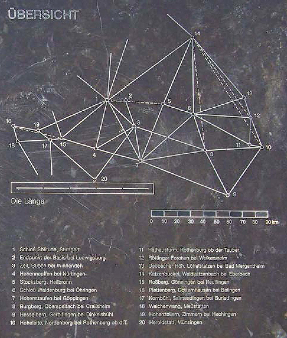 Info-Tafel im Garten der Triangulation an der Solitude-Allee zwischen Stammheim und Kornwestheim